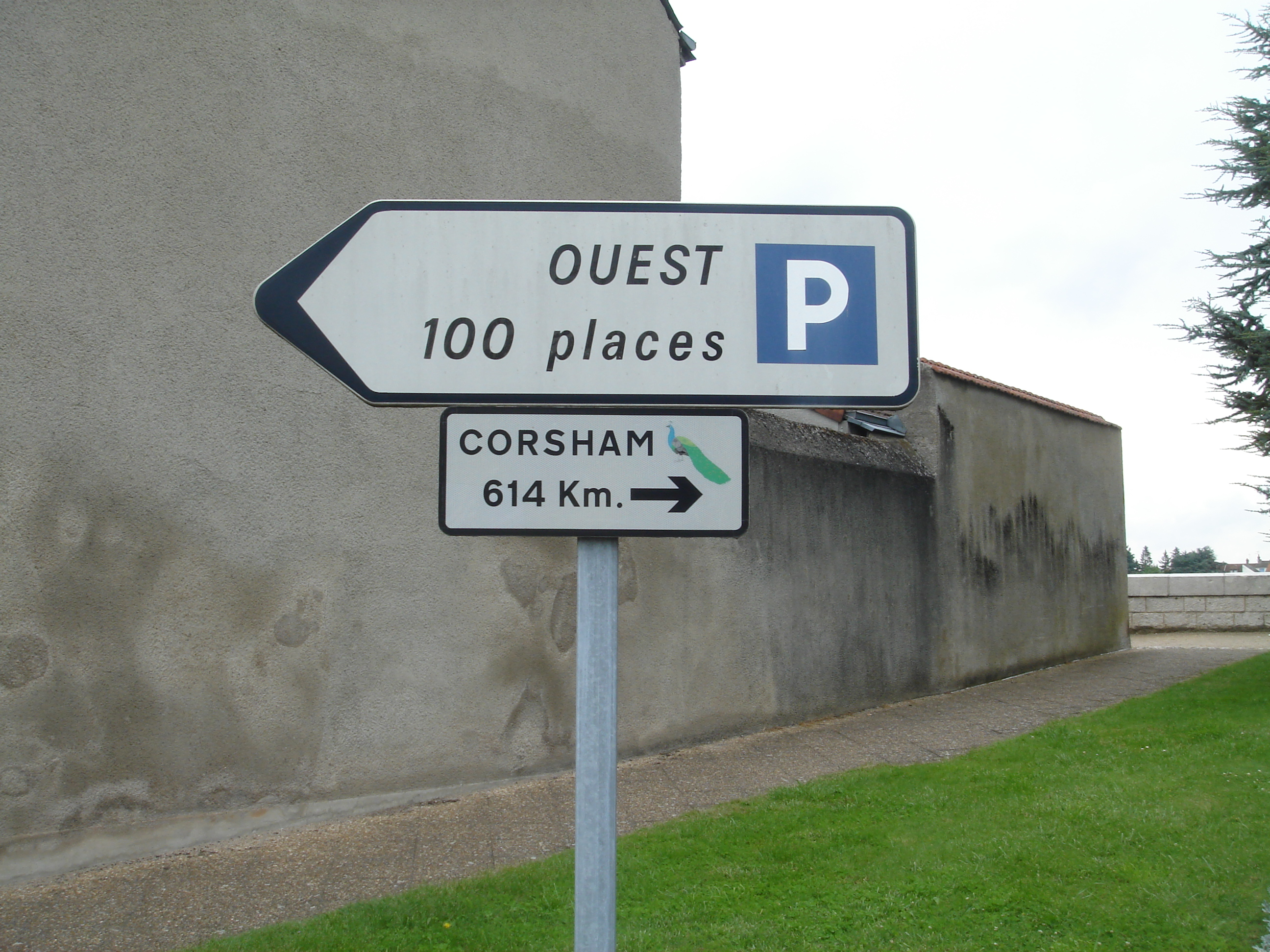 Panneau Corsham 614 km Ville anglaise jumelée à Jargeau